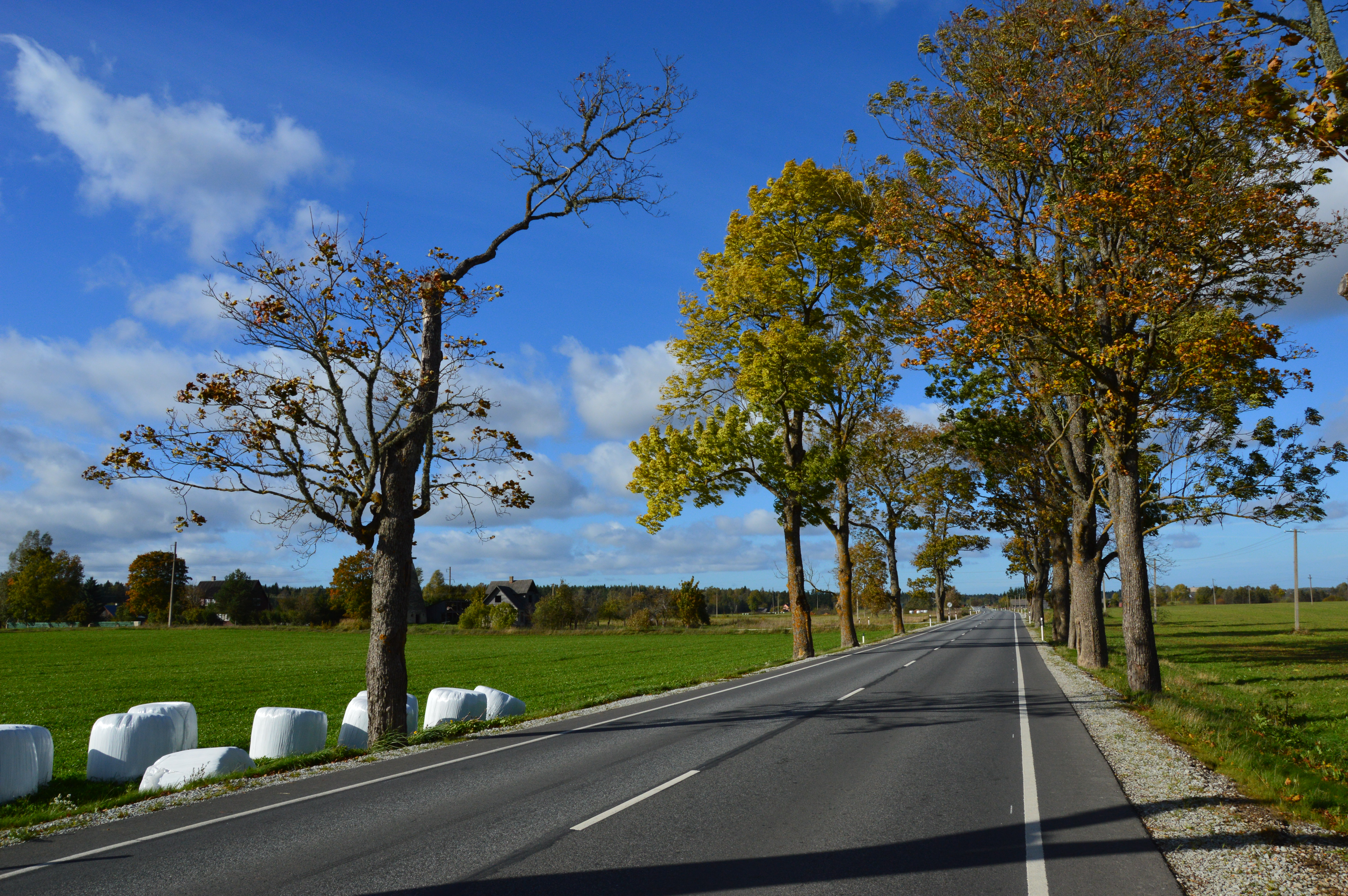 Kurtna mõisa allee.